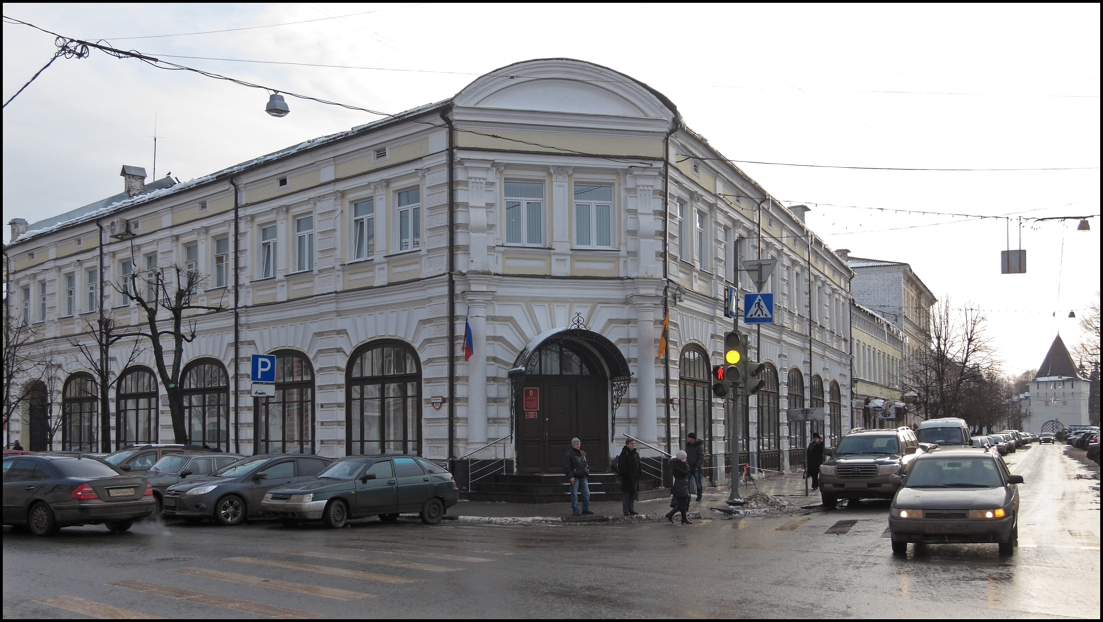 Торговый дом Вахрамеева (Ярославская область, Ярославль, Андропова улица, 9/9)